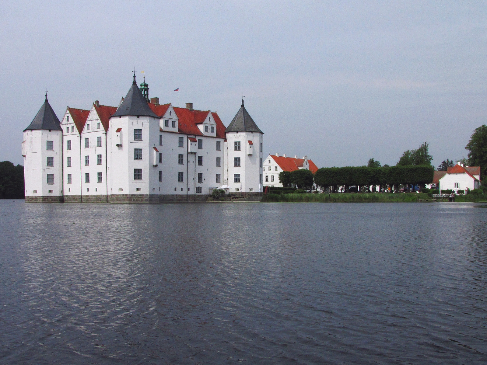 Kulturdenkmal Schloss Glücksburg 4.1e Wasserschloss und rechts der Wirtschaftshof mit Torhaus Ansicht von Südost - Schleswig-Holstein - Foto Wolfgang Pehlemann Steinberg/Ostsee IMG_8108